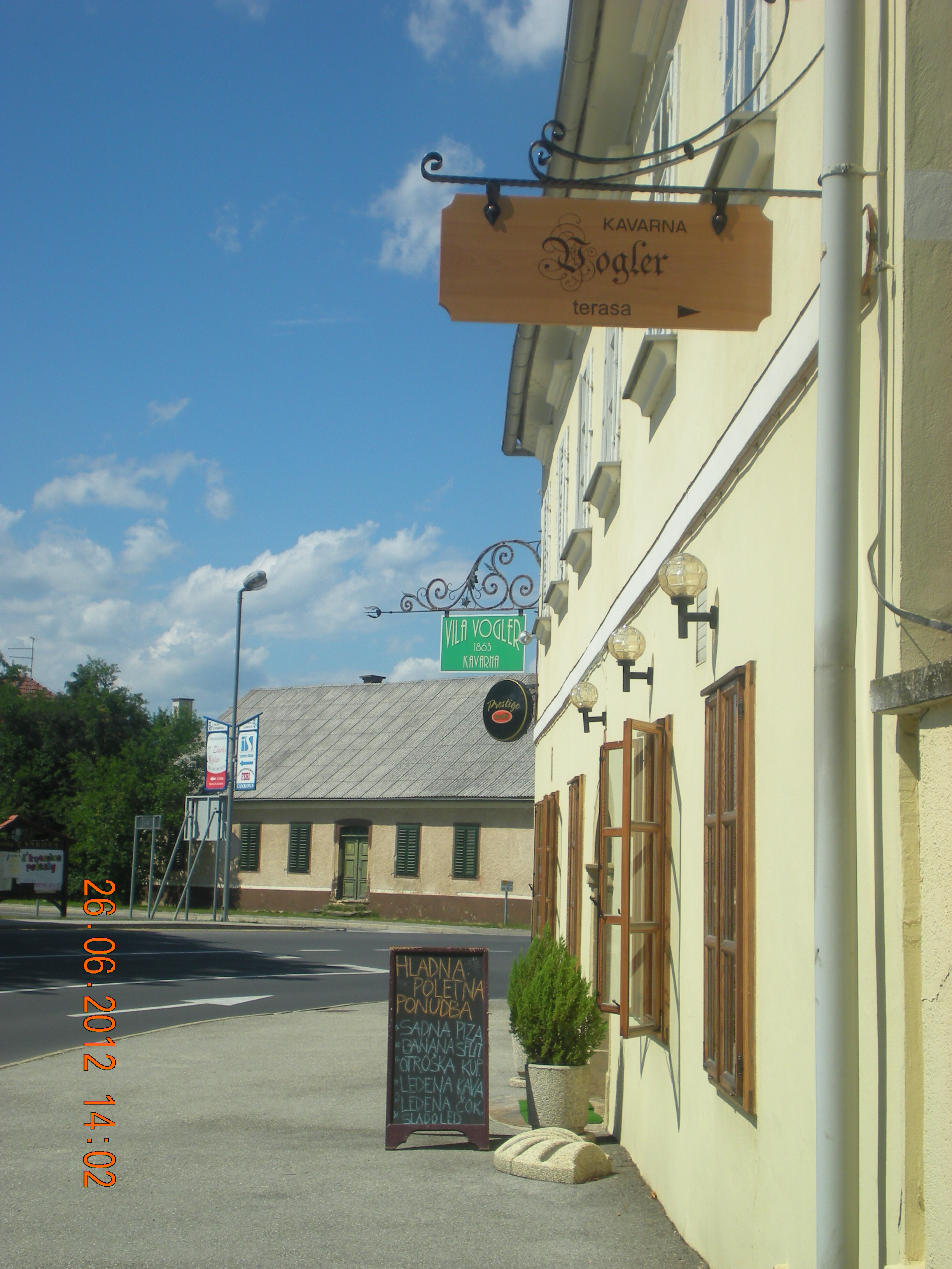 Kovan izvesek iz konca 19. stoletja krasi objekt Vogler še danes.